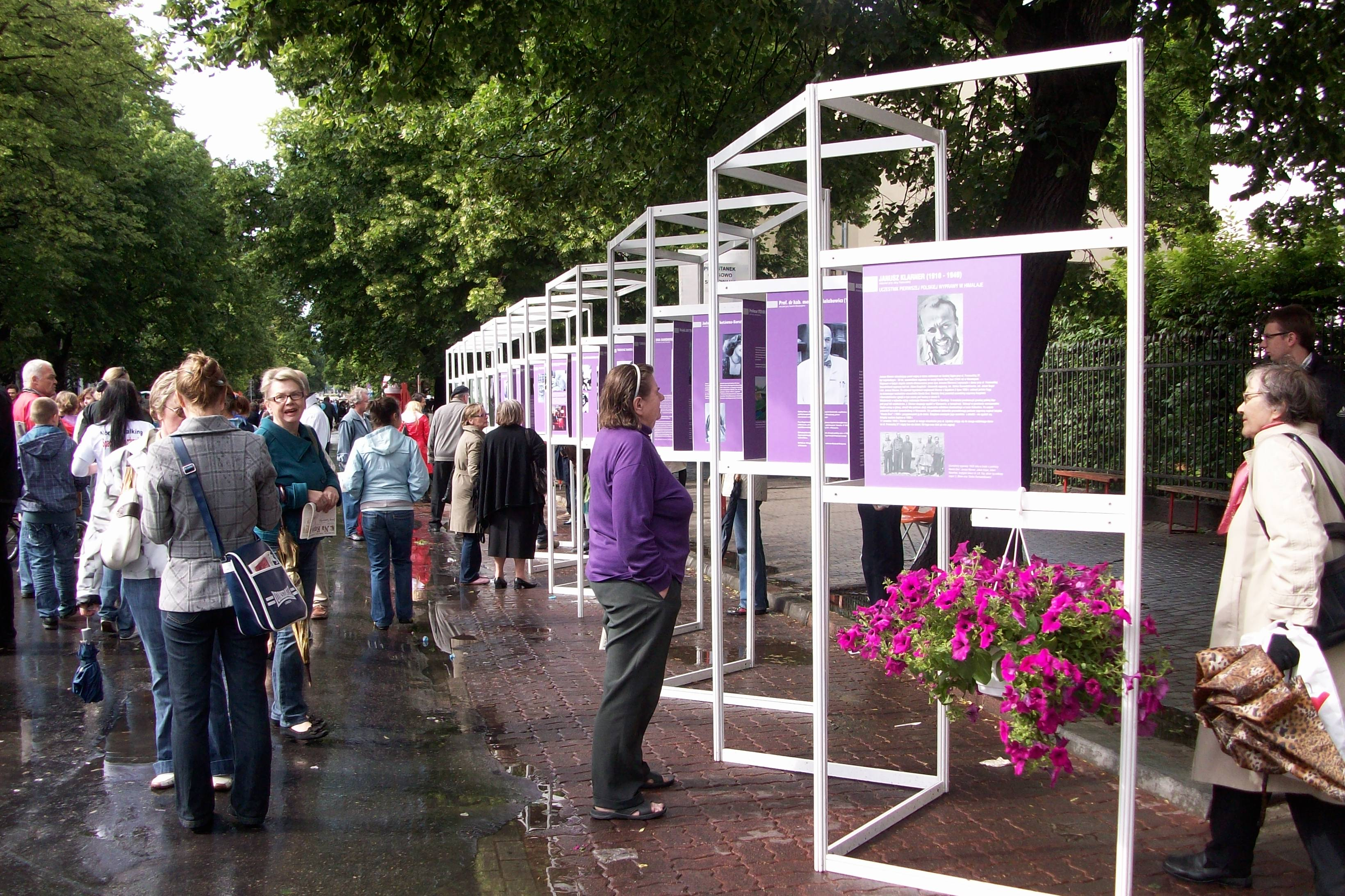 Święto Saskiej Kępy na ulicy Francuskiej w 2009 roku - wystawa "Ludzie Saskiej Kępy"